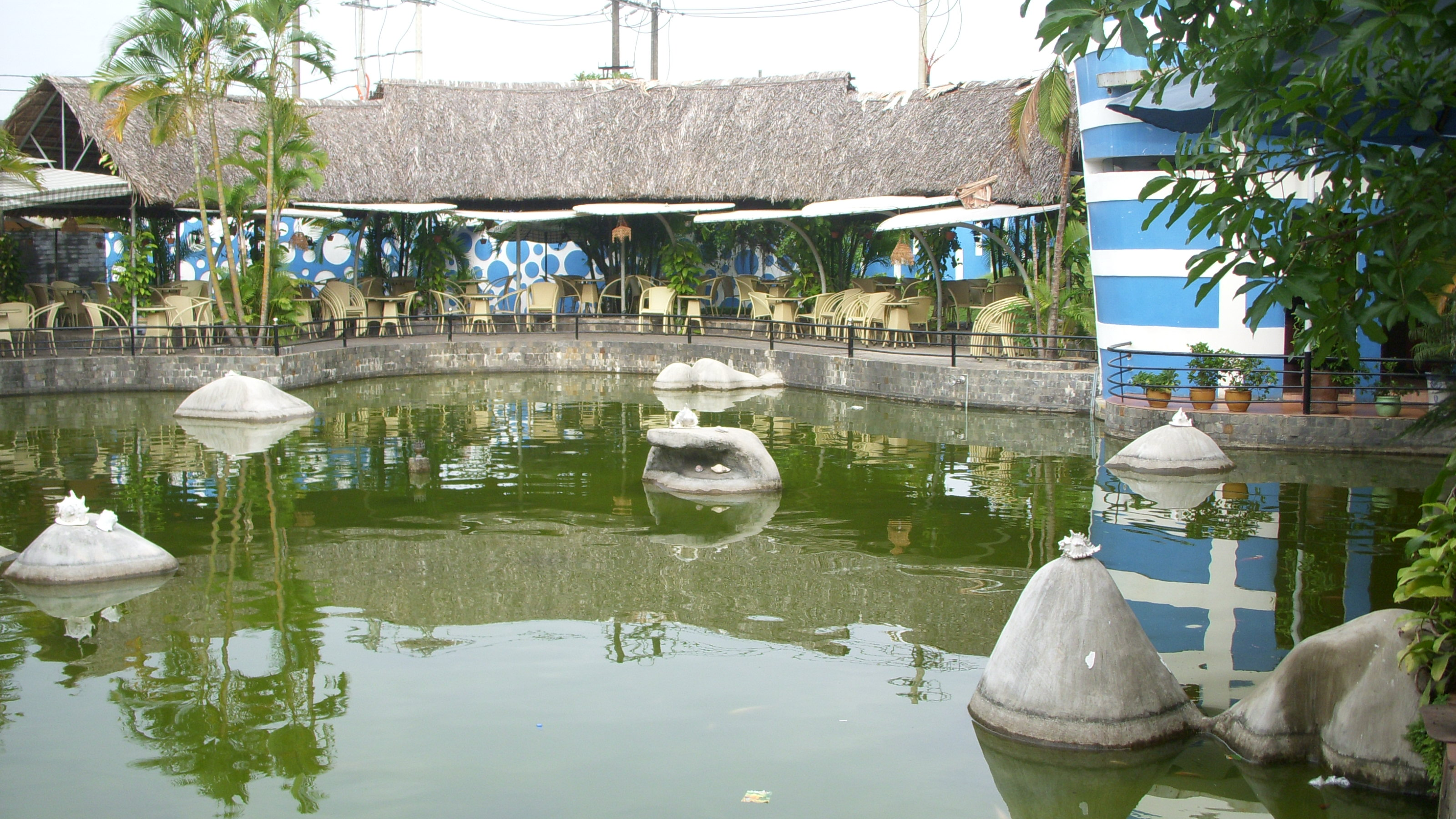 Thành phố Quảng Ngãi, Việt Nam